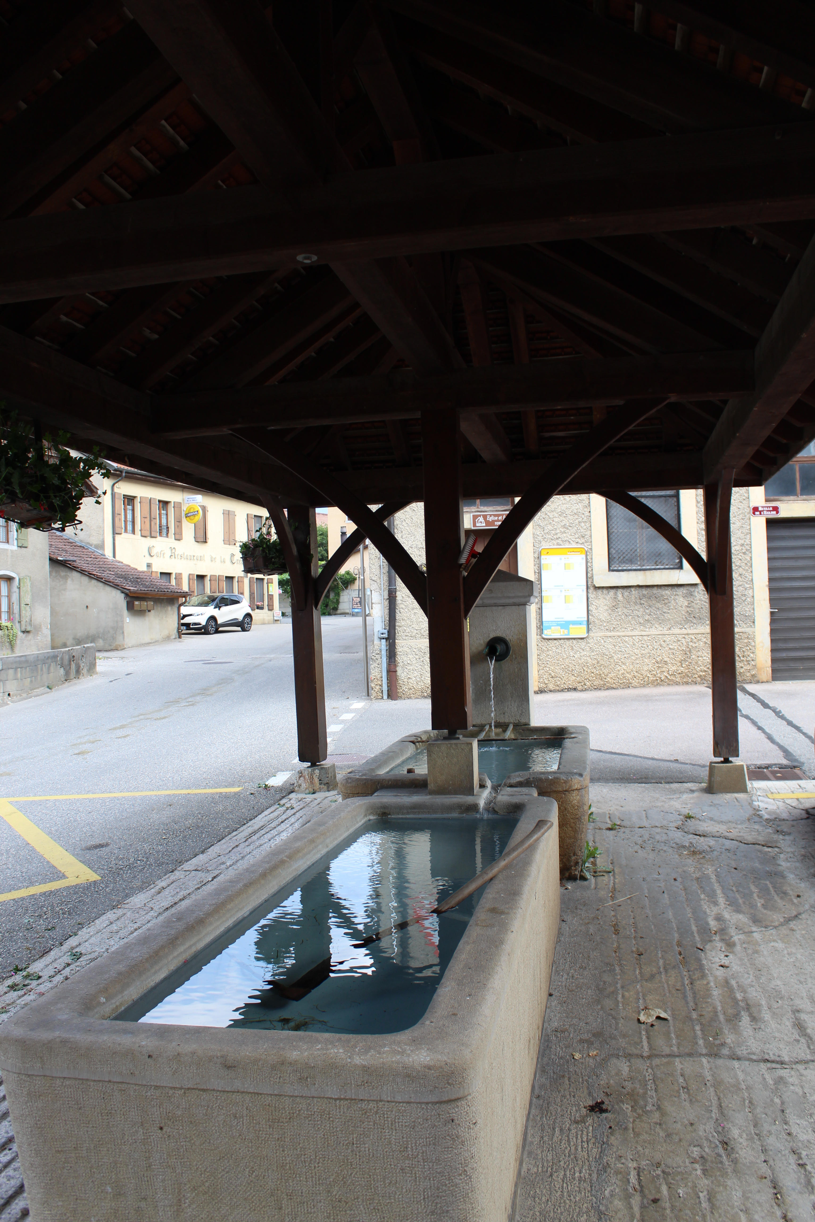 Fontaine-lavoir